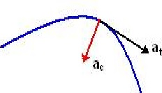 Autore: Vincenzo Gugliotta Descrizione: moto bidimensionale generico con vista delle accelerazioni in gioco